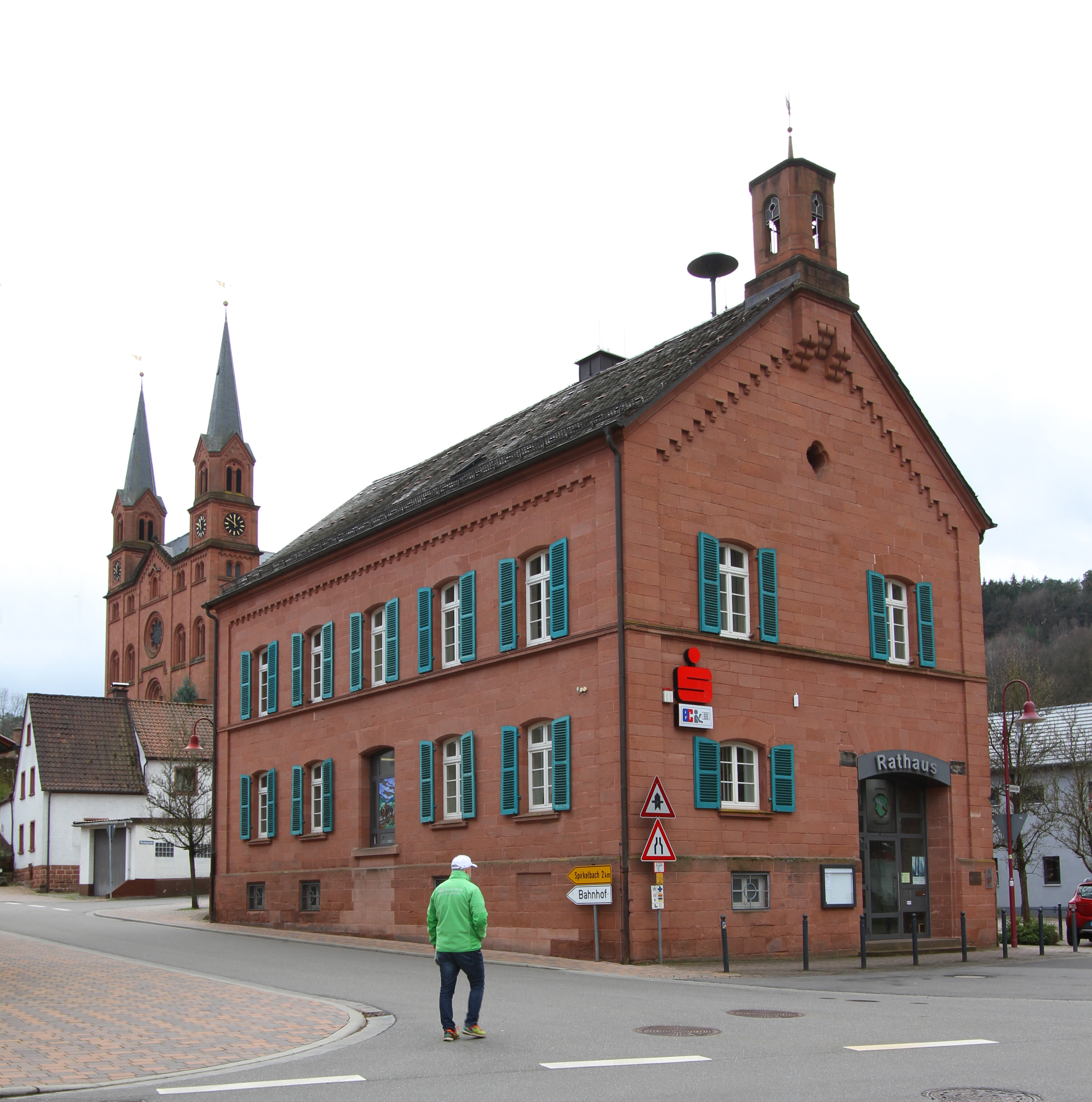 Wilgartswiesen